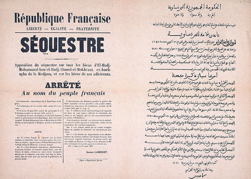 Affiche administrative. Arrêté de séquestre du commissaire extraordinaire de la République, concernant les biens de el Hadj Mohamed el Mokhrani. 25 mars 1871. Texte en français et en arabe.